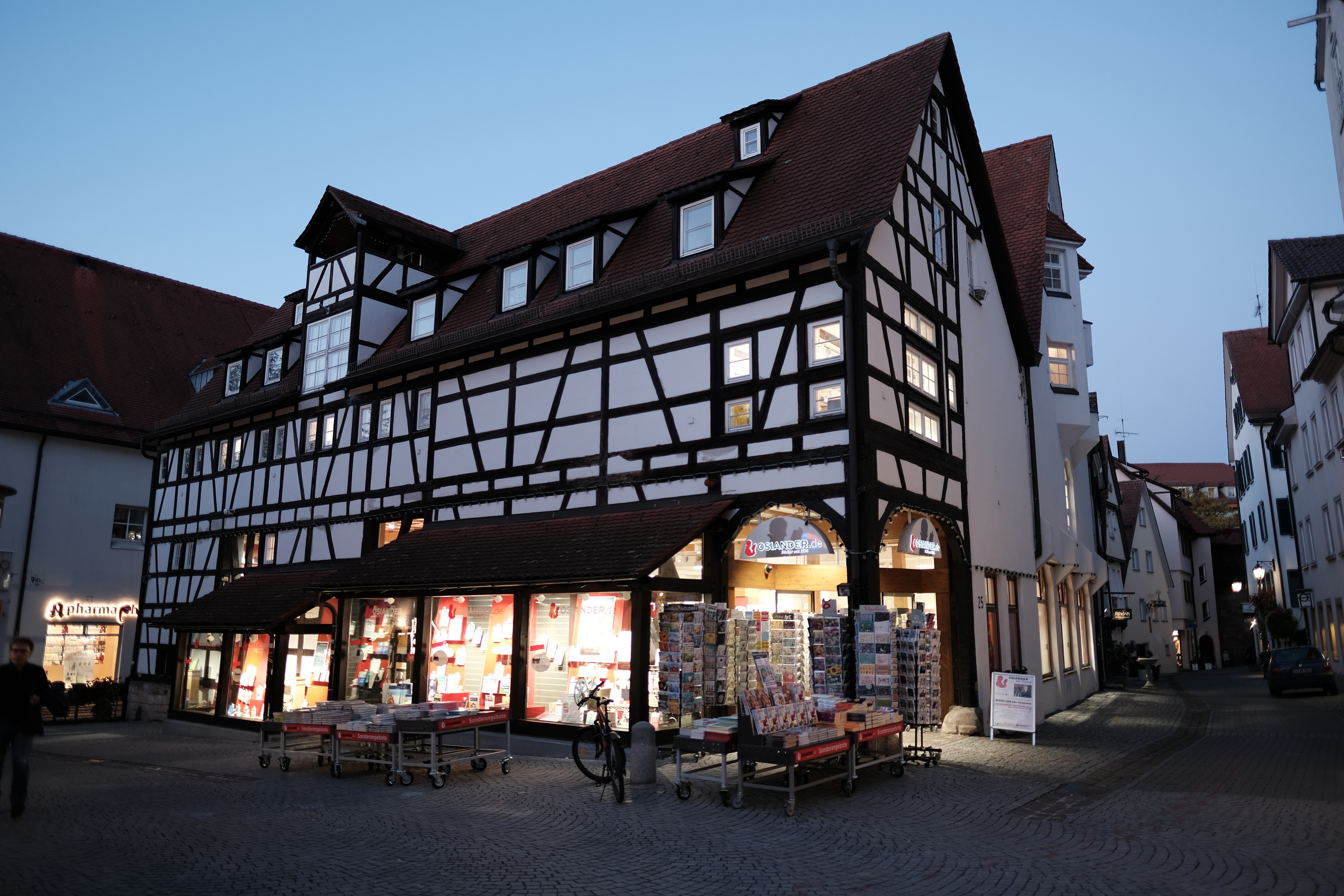 Osiander in der Innenstadt in Tübingen